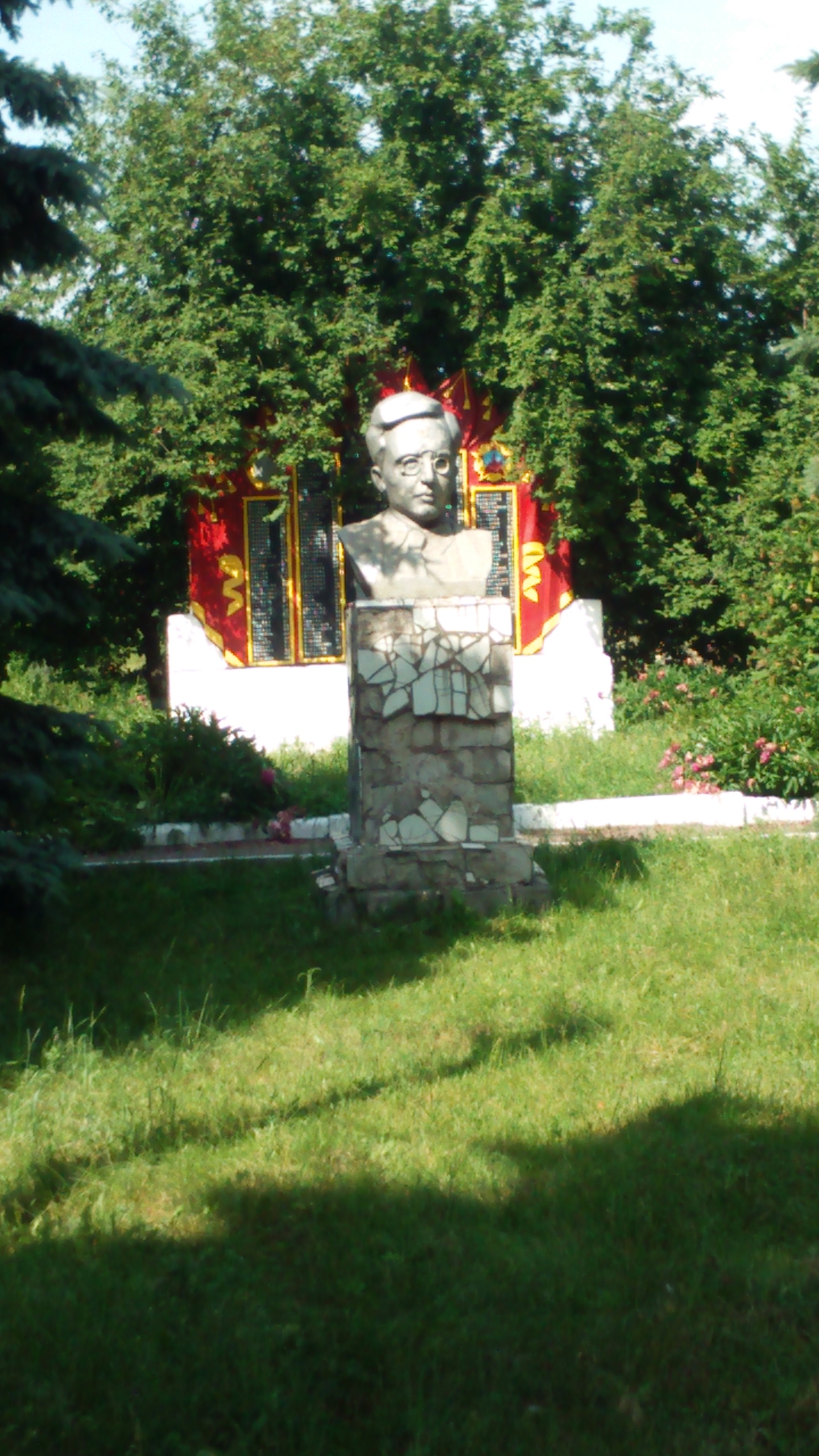 Нововодя́не — село в Україні, Добропільському районі Донецької області, над річкою Водяна.